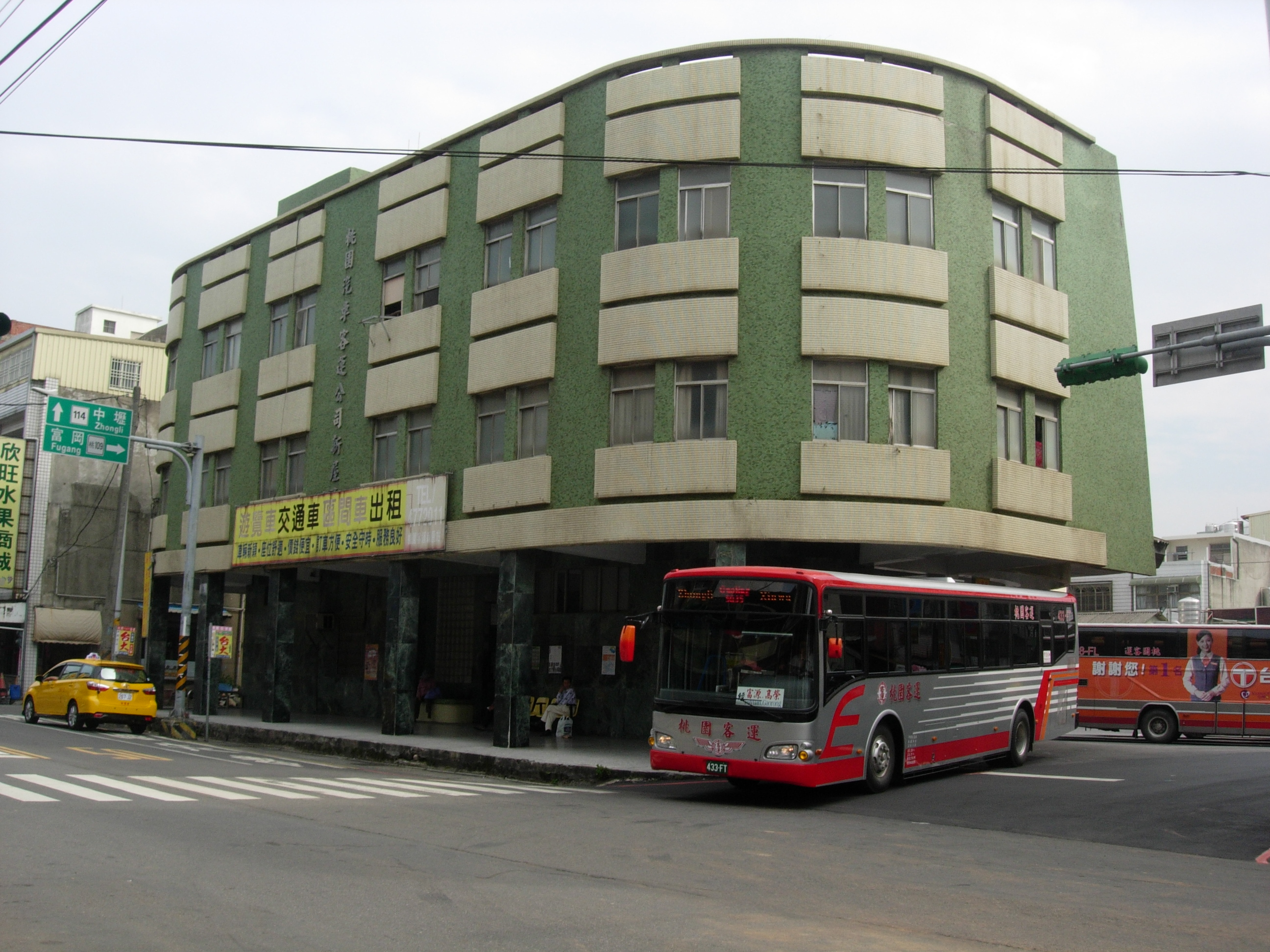 中文（台灣）: 桃園客運新屋站。